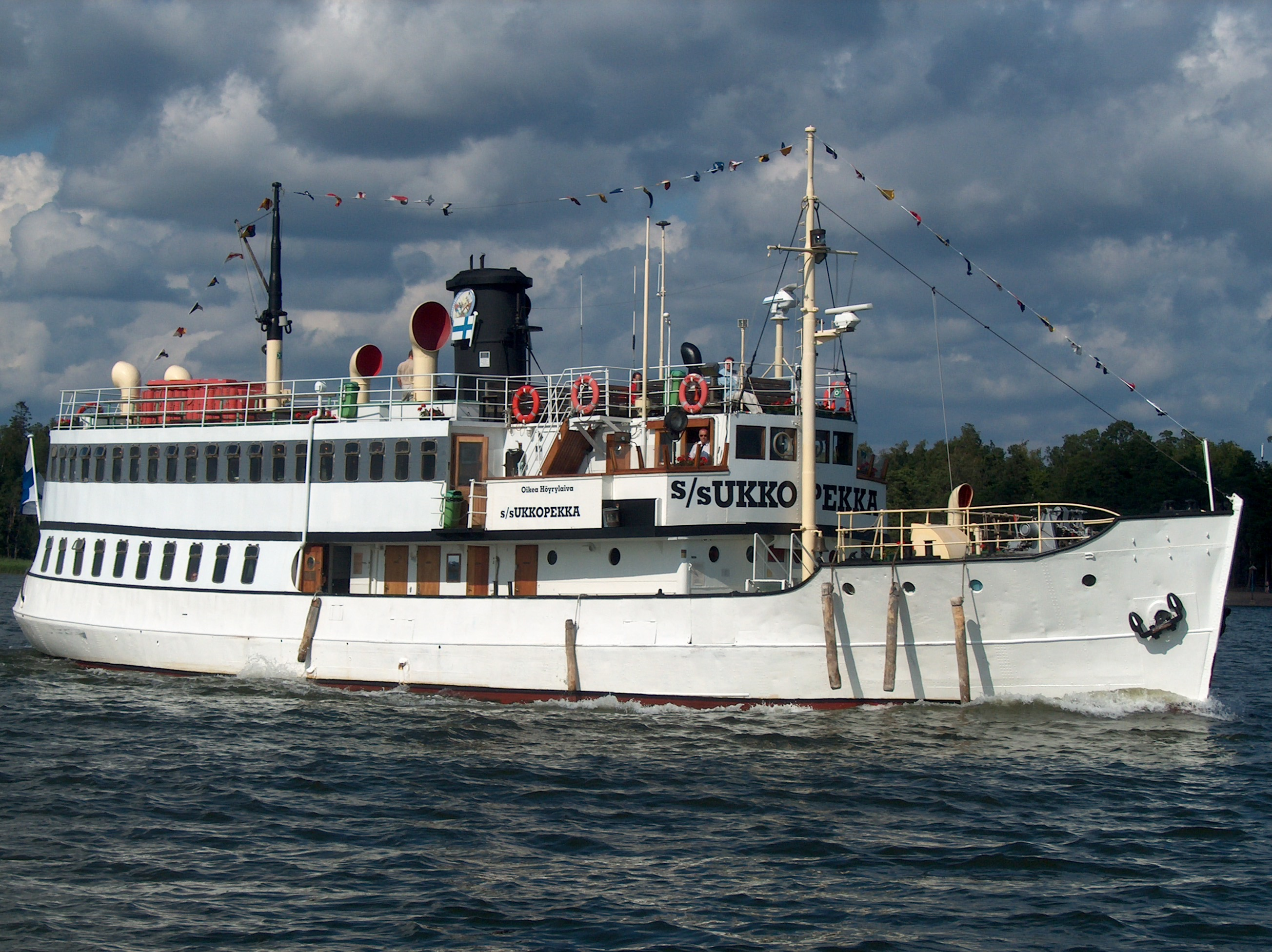 SS Ukkopekka